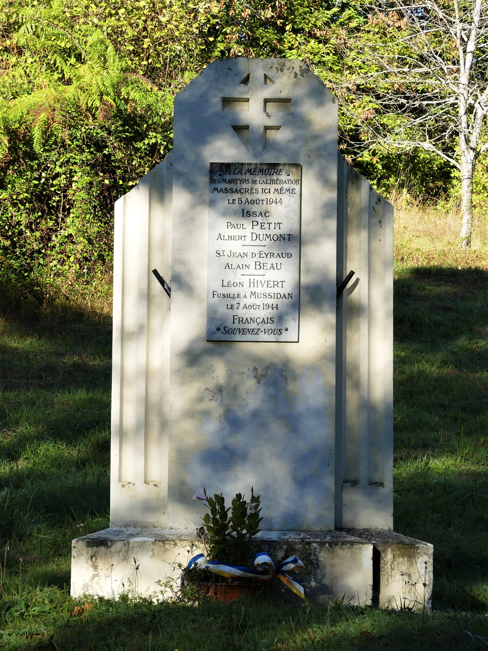 Stèle à la mémoire des personnes fusillées le 5 août 1944, le long de la route départementale 15, Saint-Jean-d'Eyraud, Dordogne, France.